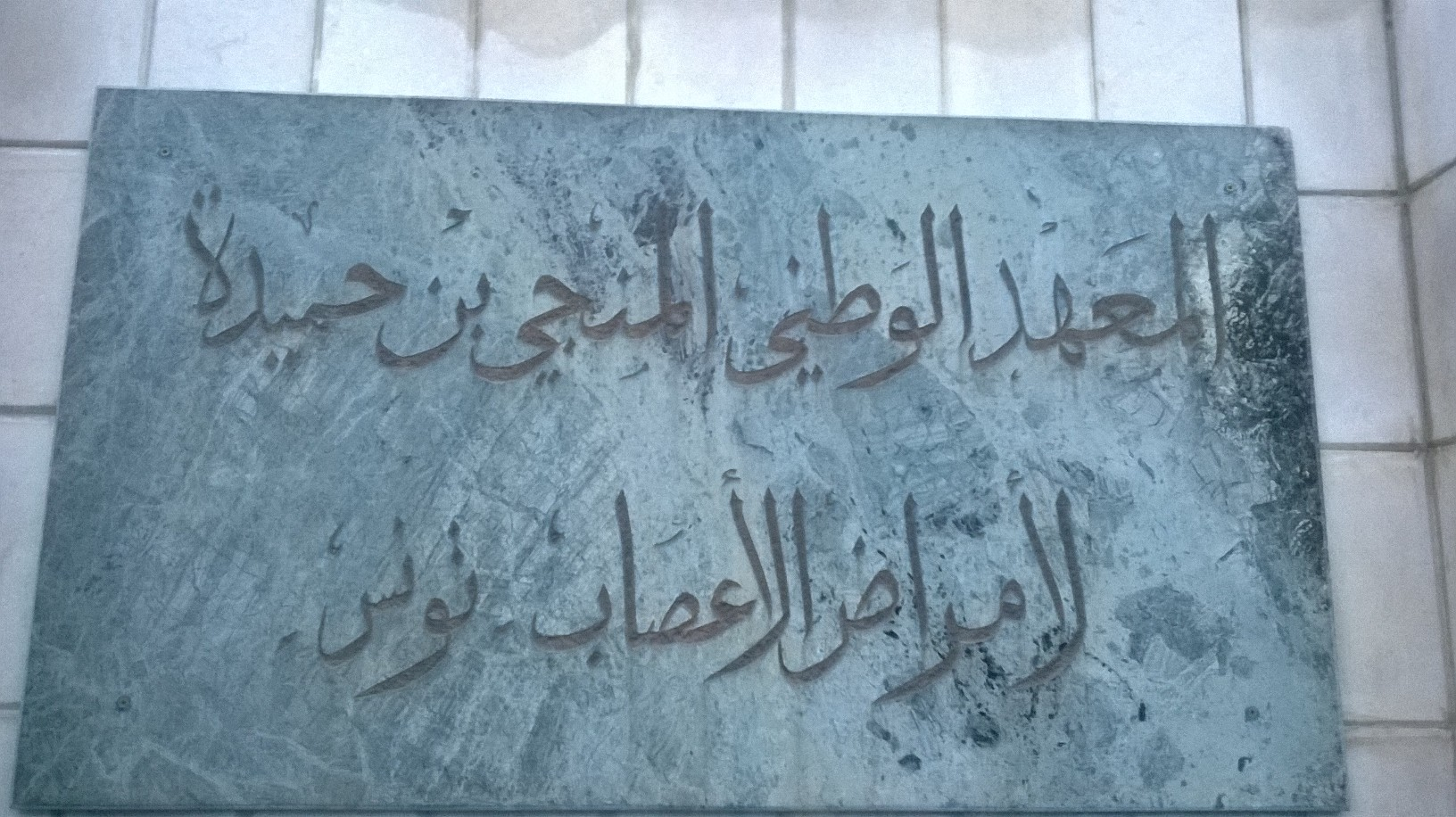 Tunis تونس